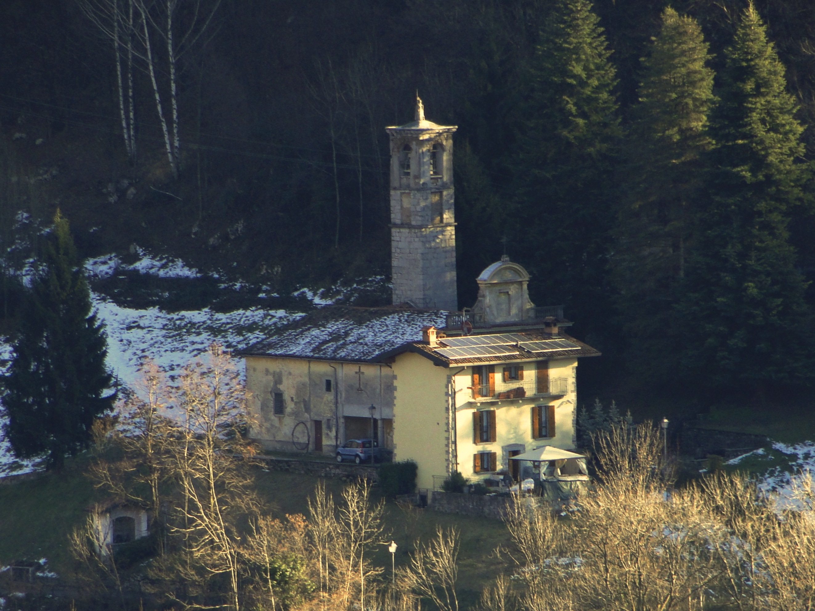 Brumano, fraz. di Alzano Lombardo (BG), Italy. Chiesa Ss. Redentore